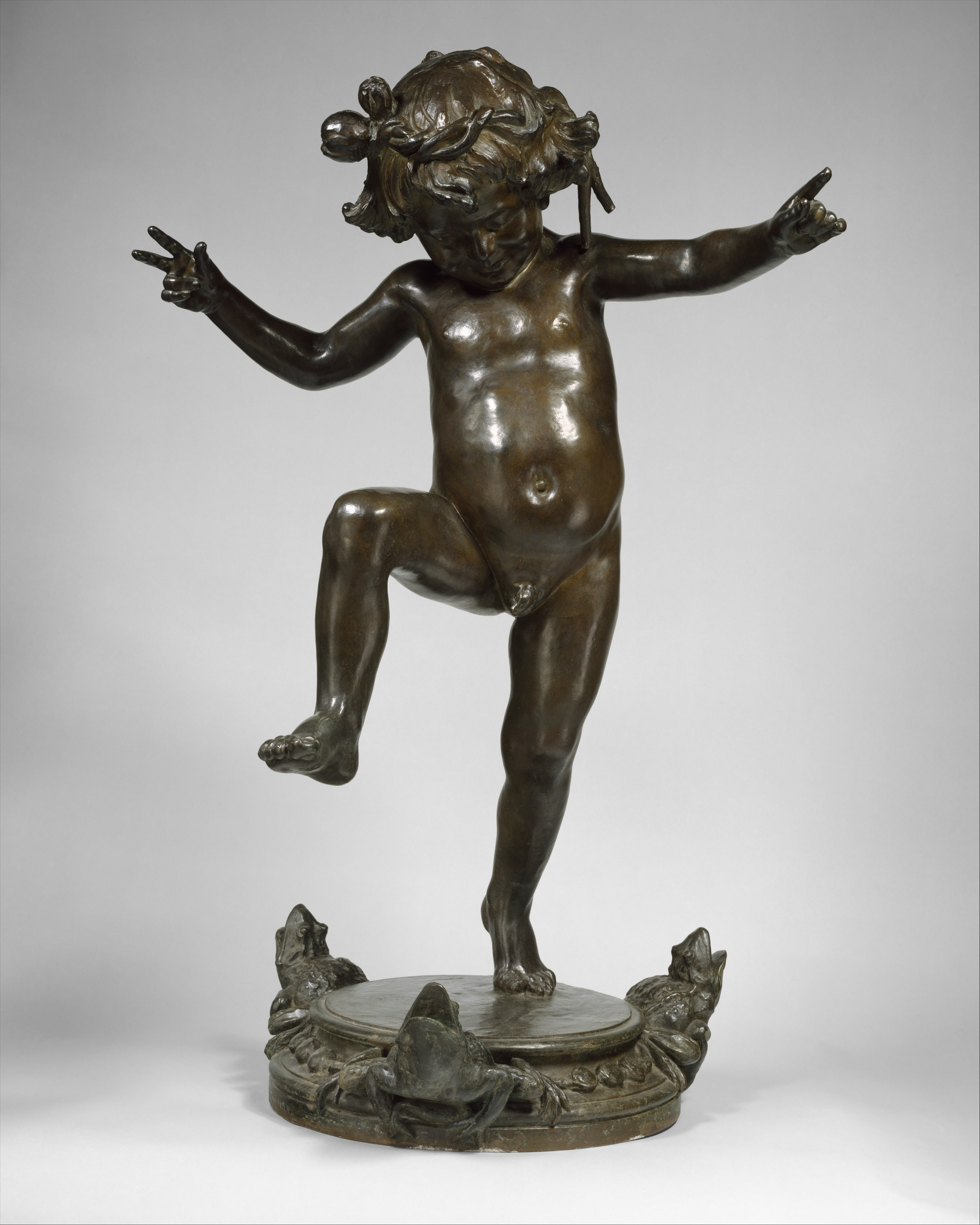 Sculpture; Sculpture